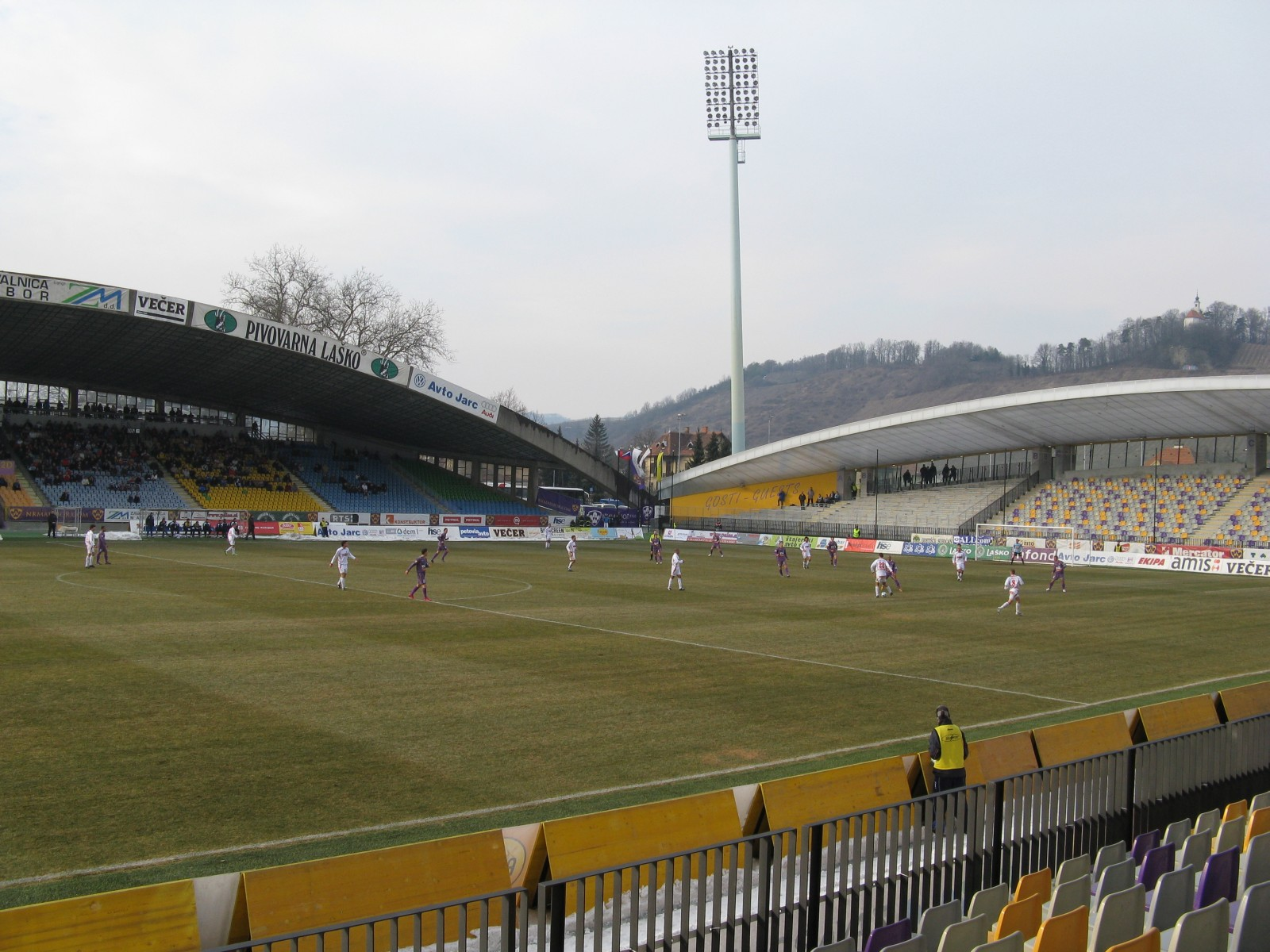 NK Maribor - NK Drava ; 21. 2. 2009